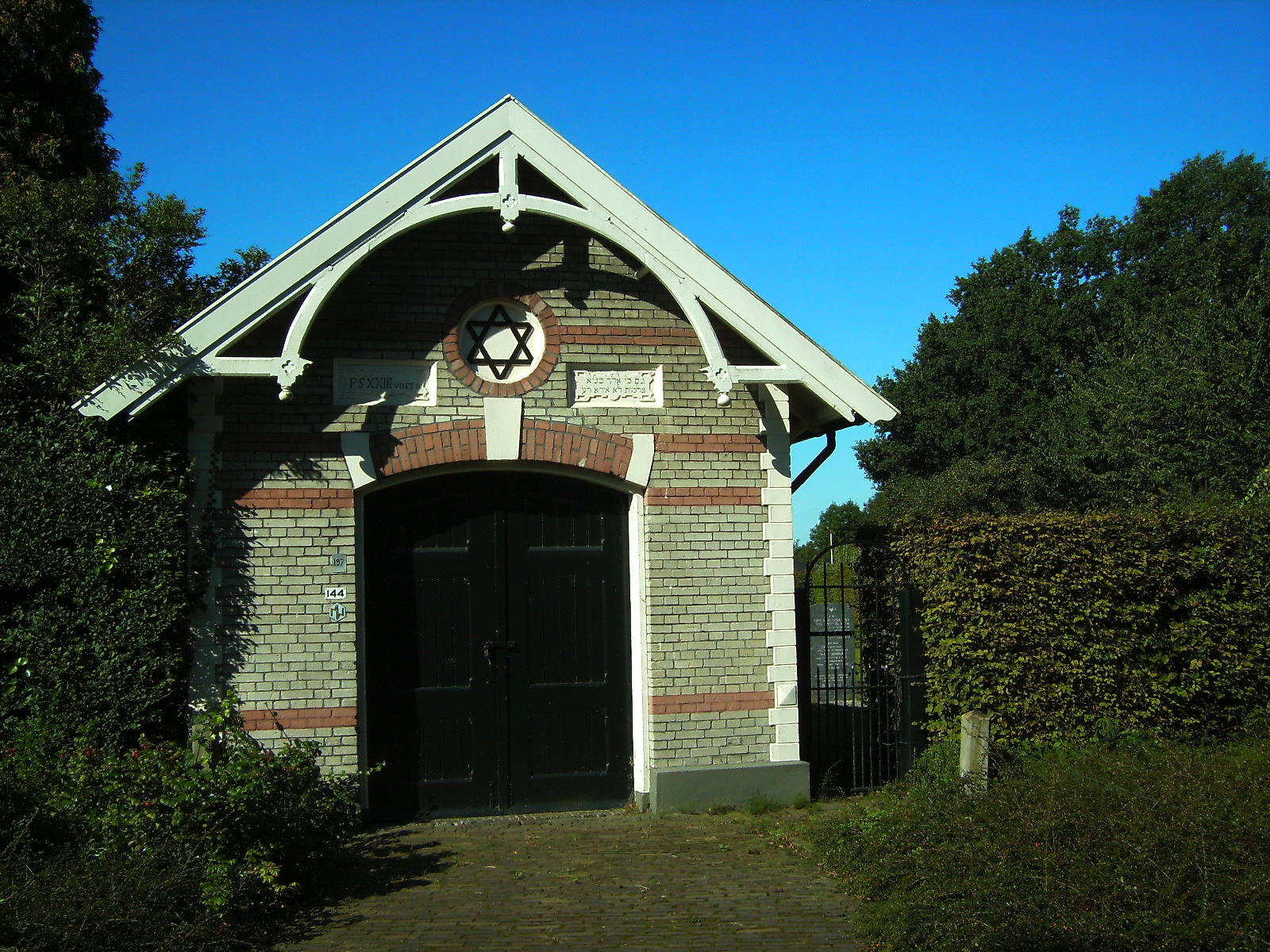 Baarhuisje uit 1908 bij de joodse begraafplaats aan de Misterweg te Winterswijk